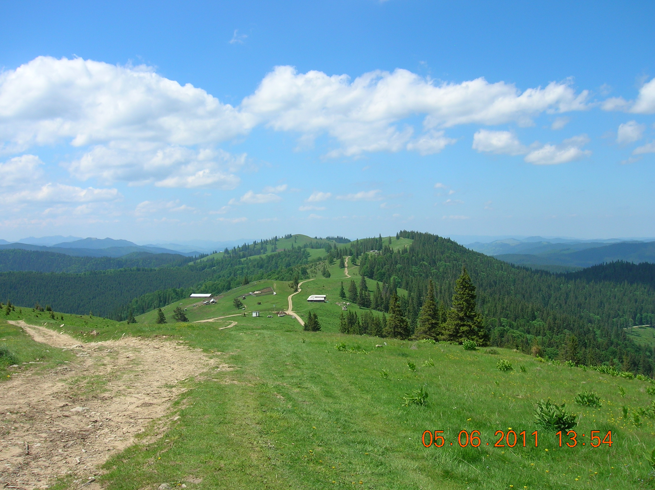 Munţii Stânişoarei (Carpaţii Orientali, România)-Vedere spre Vârful Muncelu. Intersecţia care se vede în apropierea centrului imaginii este pasul Stînişoara. Crucea Talienilor se află acolo.